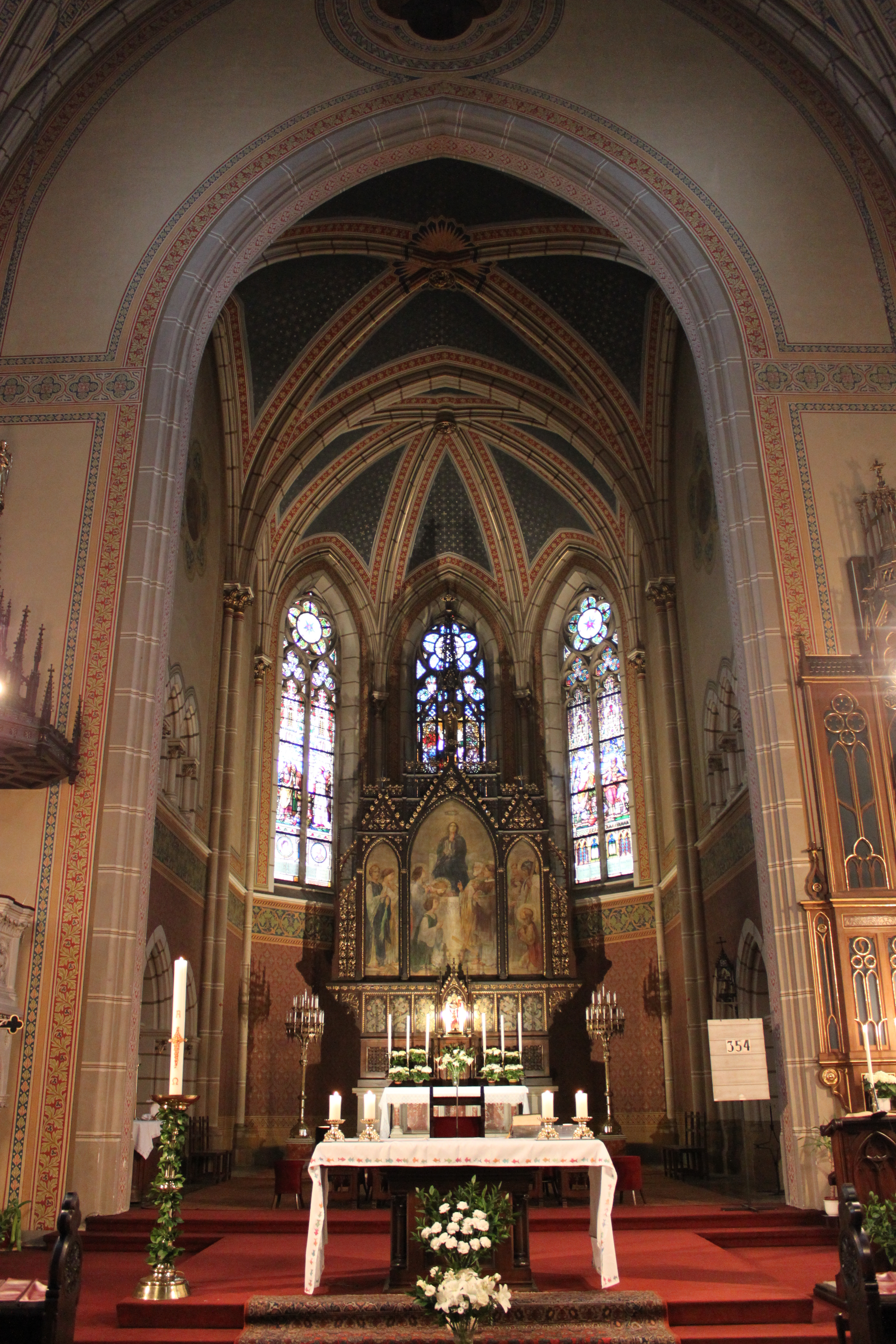 Innenraum der Rudolfsheimer Pfarrkirche, Wien 15